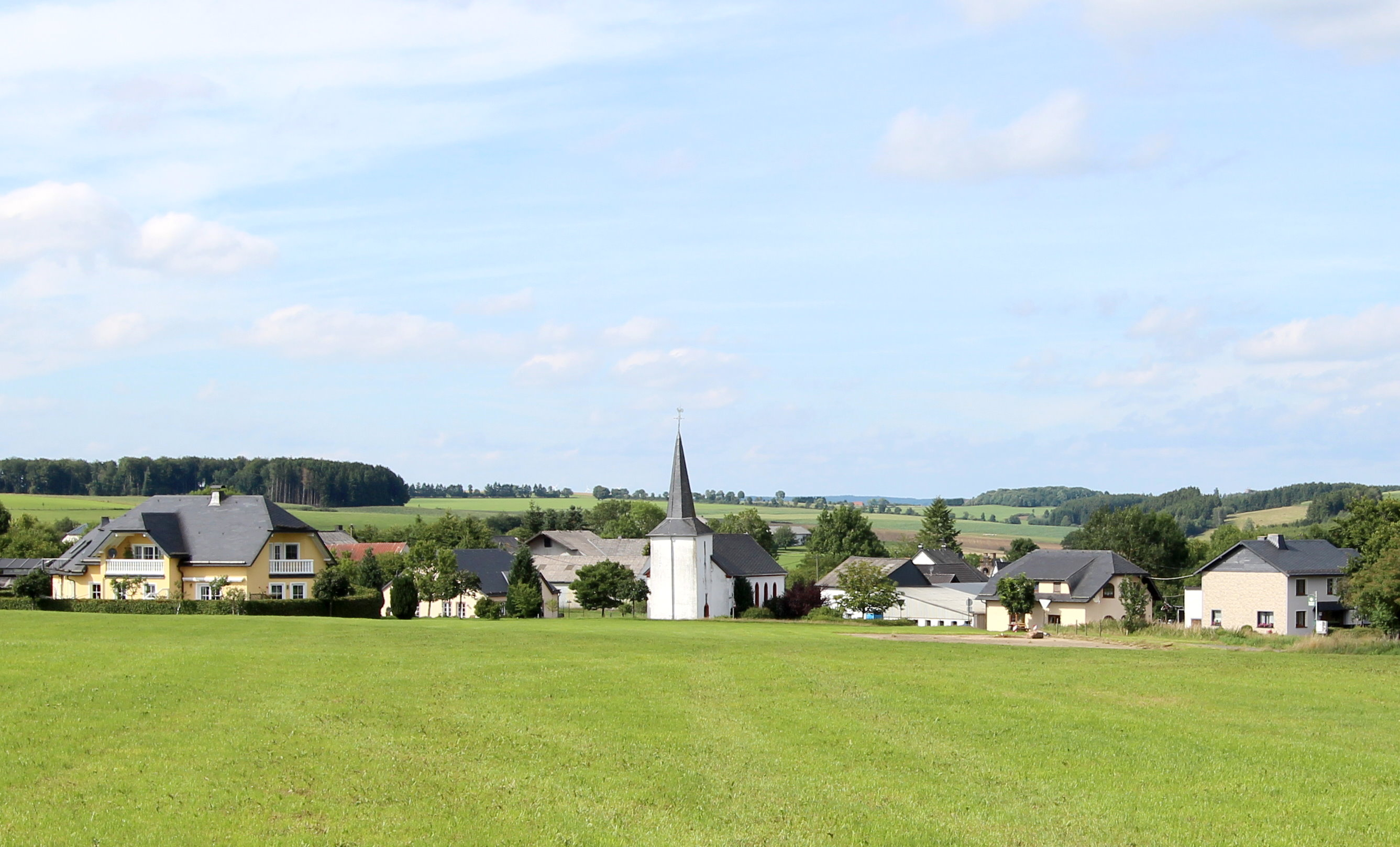 54608 Oberlascheid. Aufnahme aus Süden von 2017.